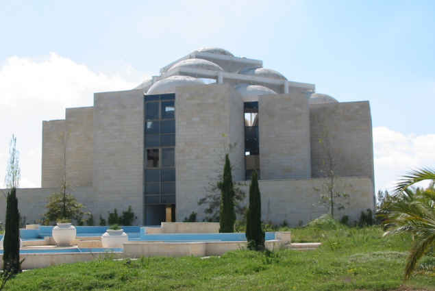 Shilo Yeshiva